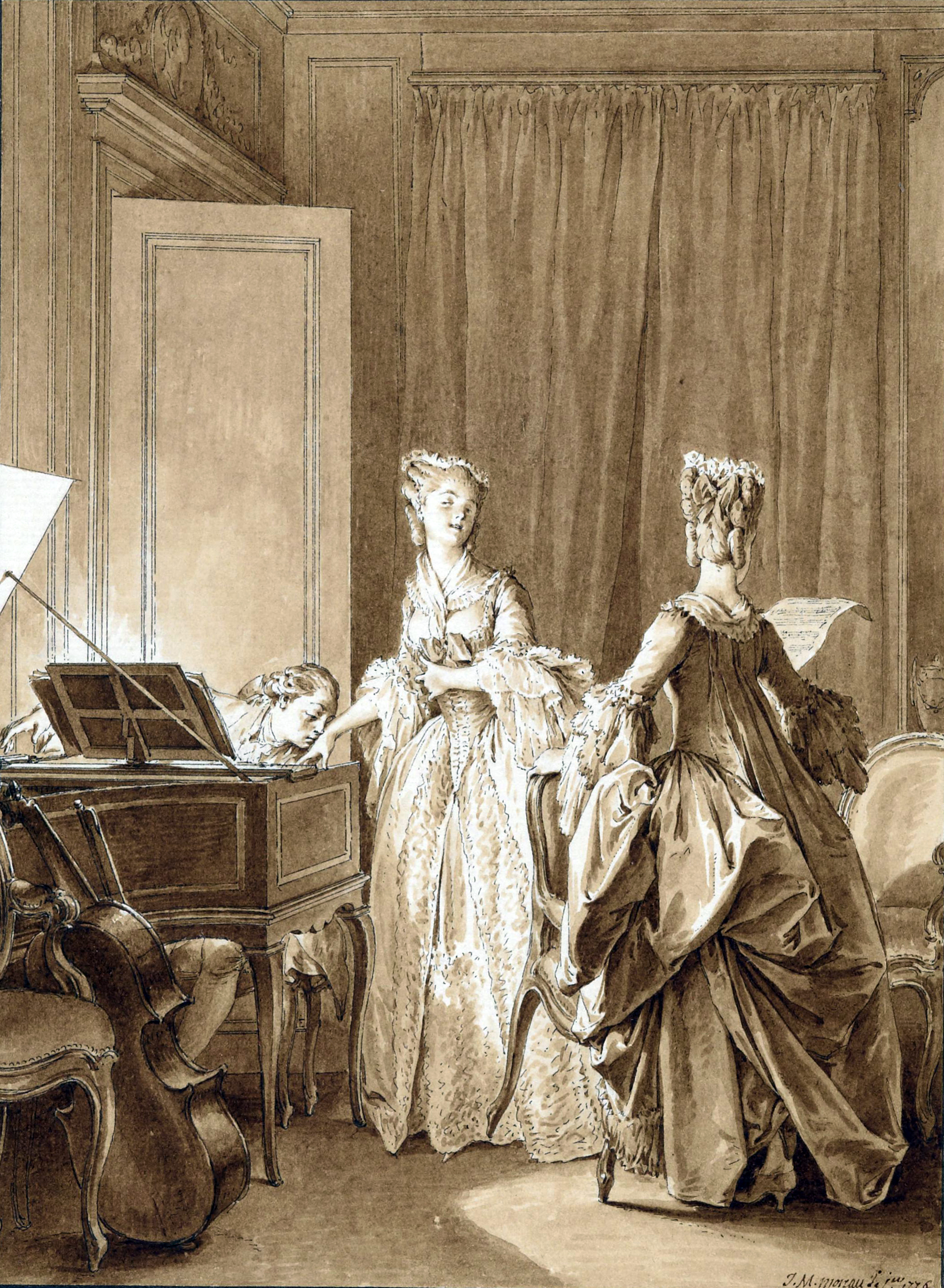 Illustration de l'édition originale de la Nouvelle Héloïse